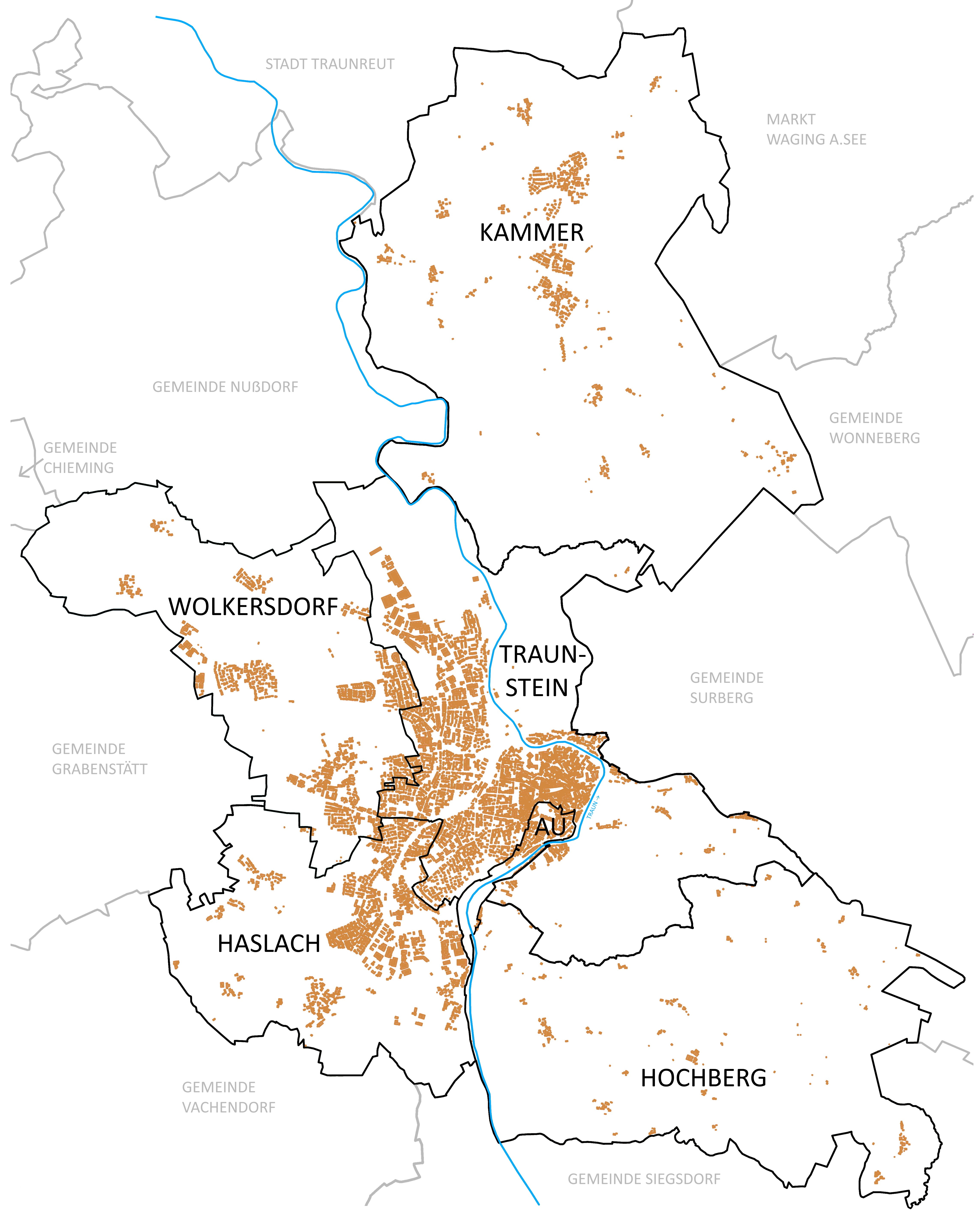 Die Ausdehnung der sechs Gemarkungen Traunsteins, vereinfacht dargestellt auf einer Karte